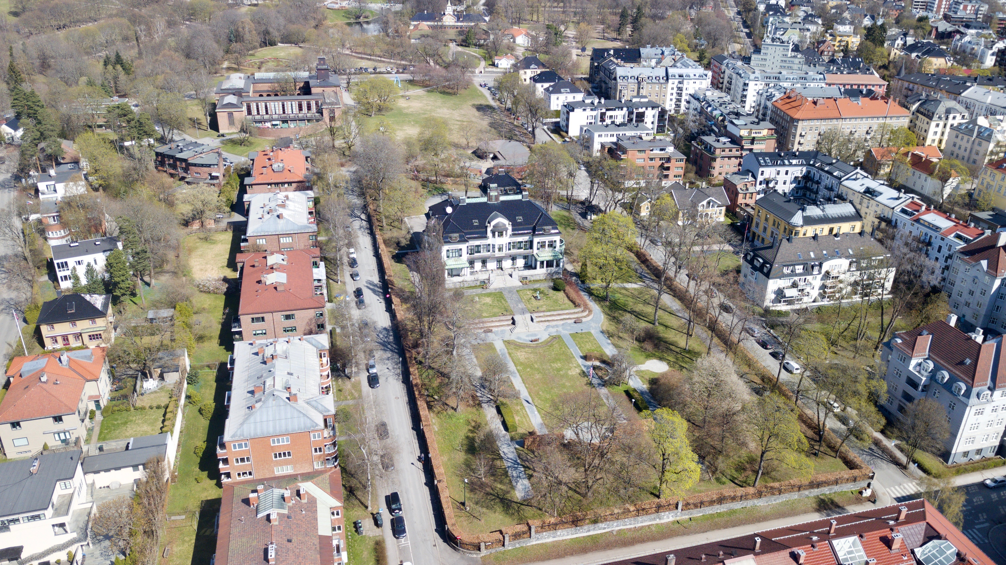 Villa Otium, Hafrsfjordgata, Nobels gate. Oslo.